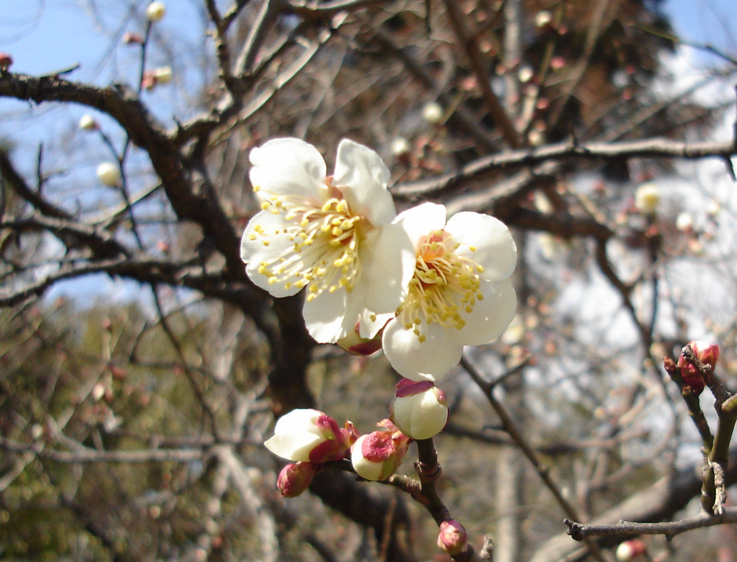 長岡天満宮 白梅 投稿者撮影 2006/03/04